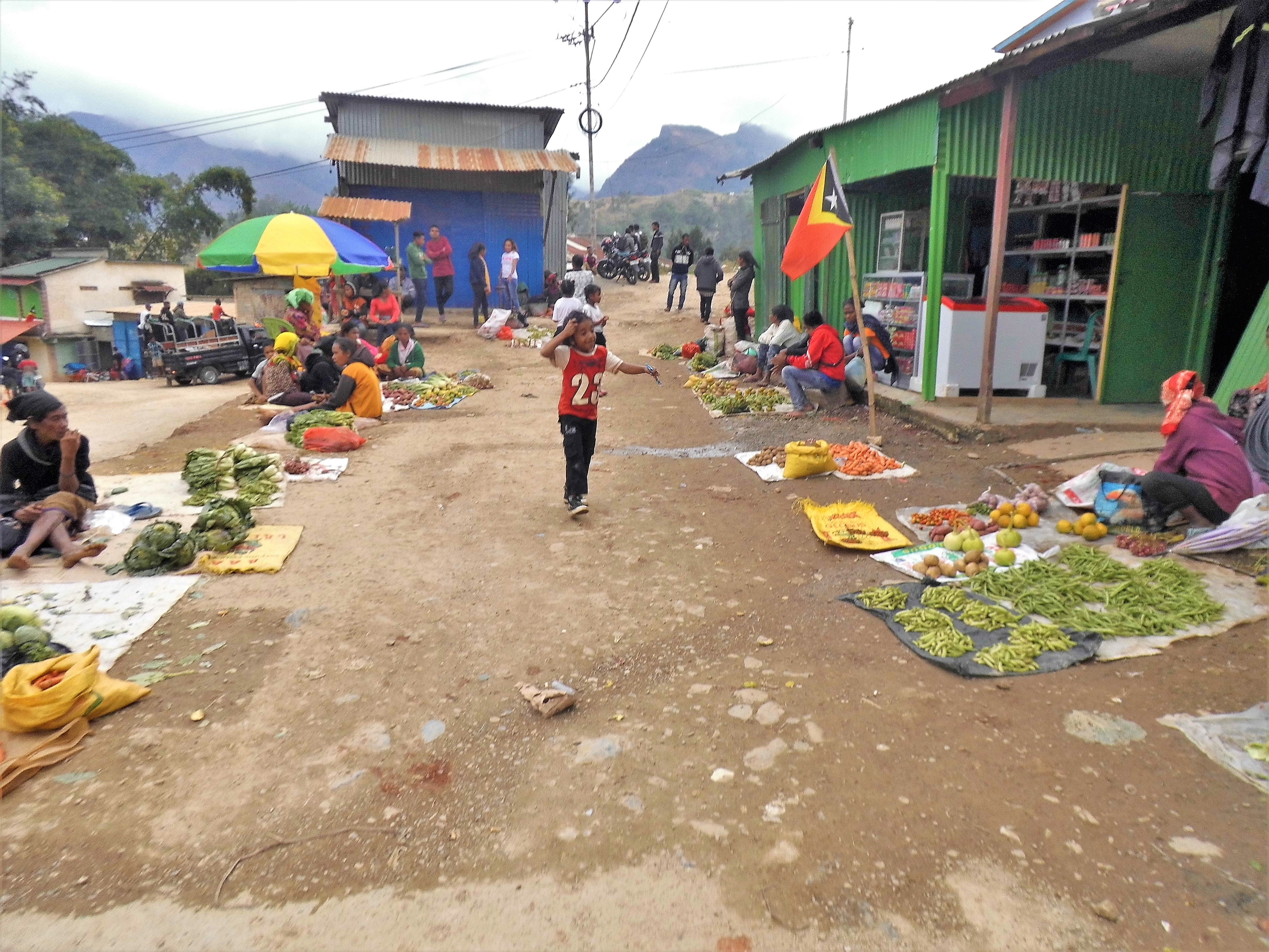 Maubisse